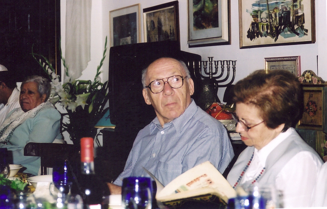 יהודית ויוסף כנען בליל הסדר- 1997